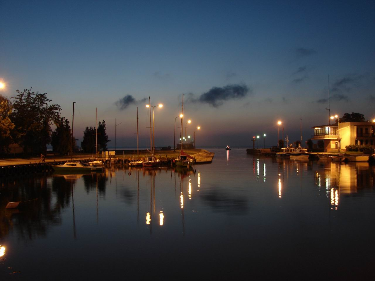 Port we Fromborku